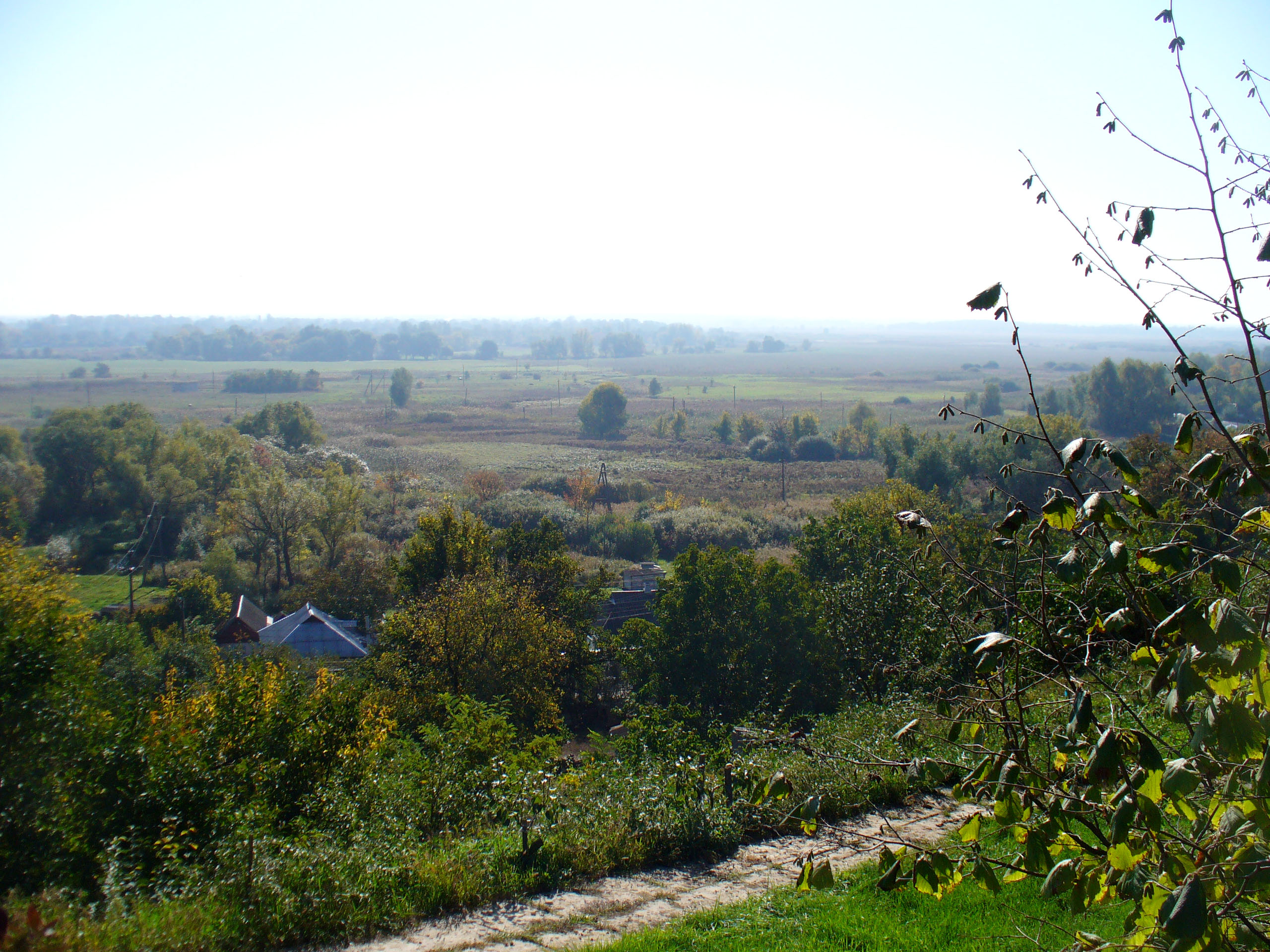 Blick in den Osten vom Stadthügel